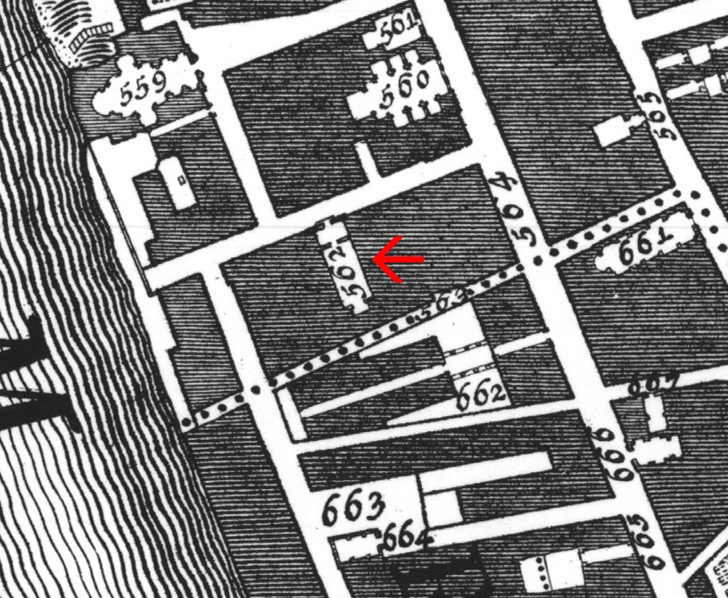 Pianta di Nolli